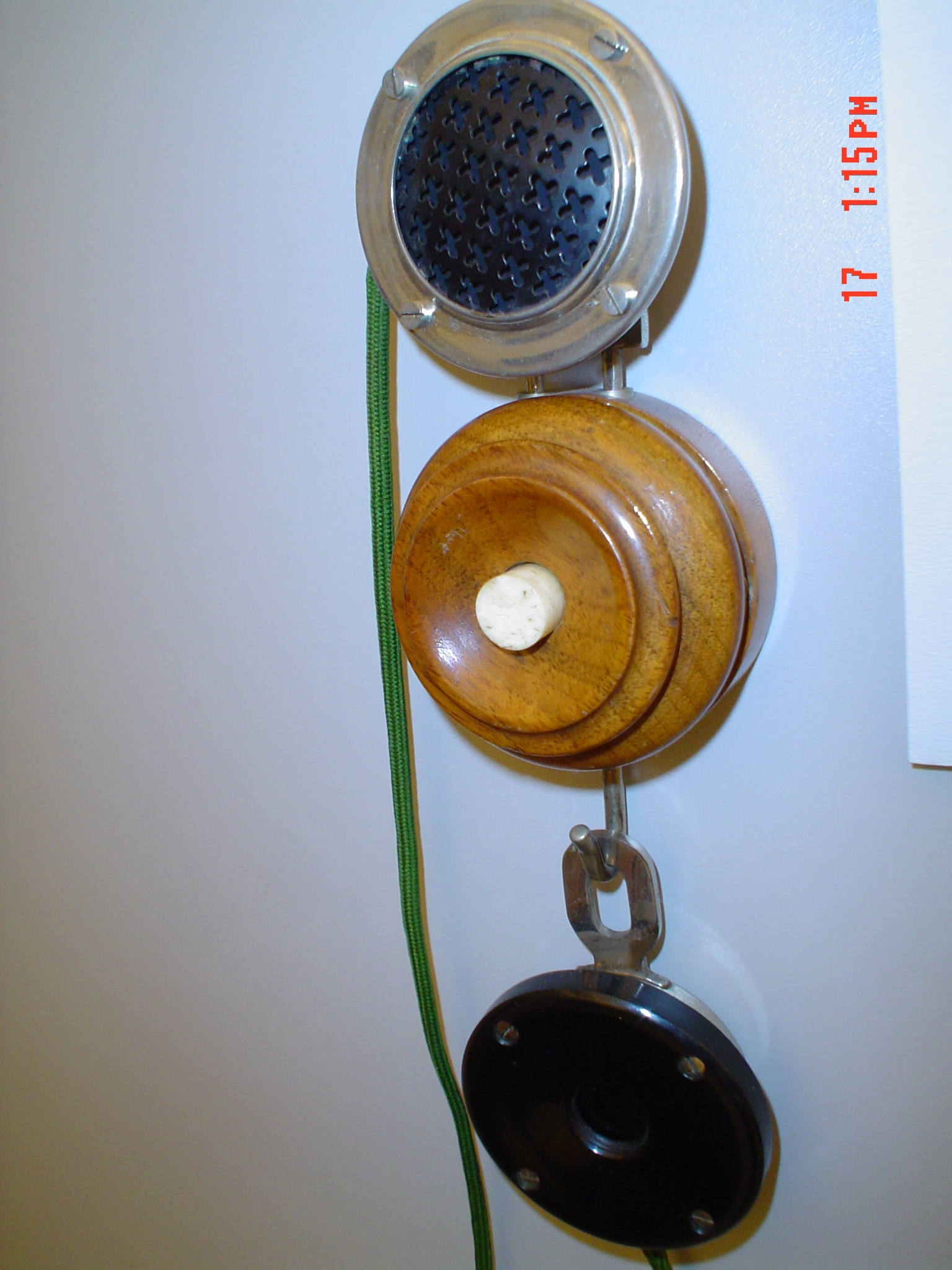 Servista telefono, supre mikrofono, sube aŭdilo